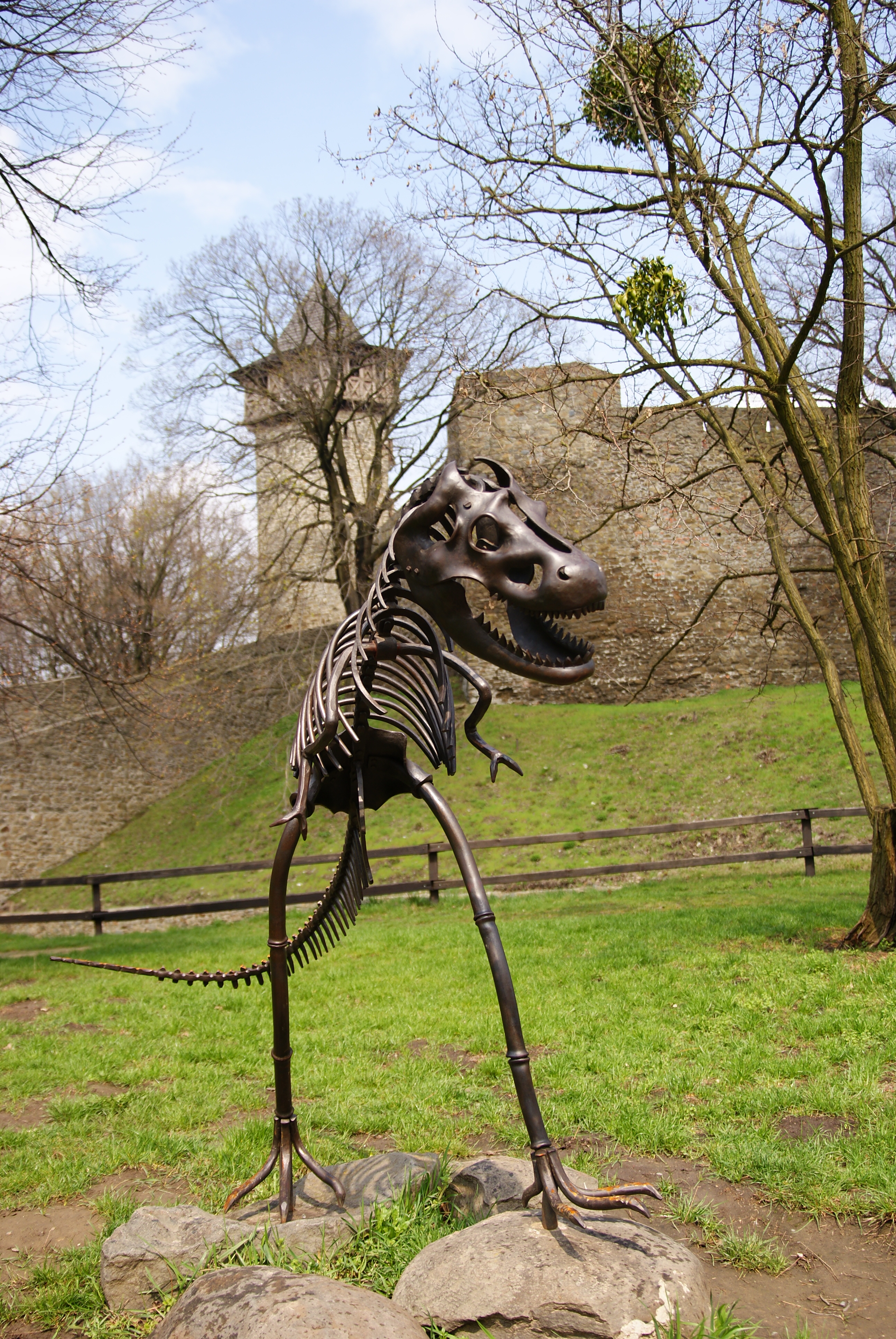 Hrad Helfštýn, zřícenina (Týn nad Bečvou), Týn nad Bečvou